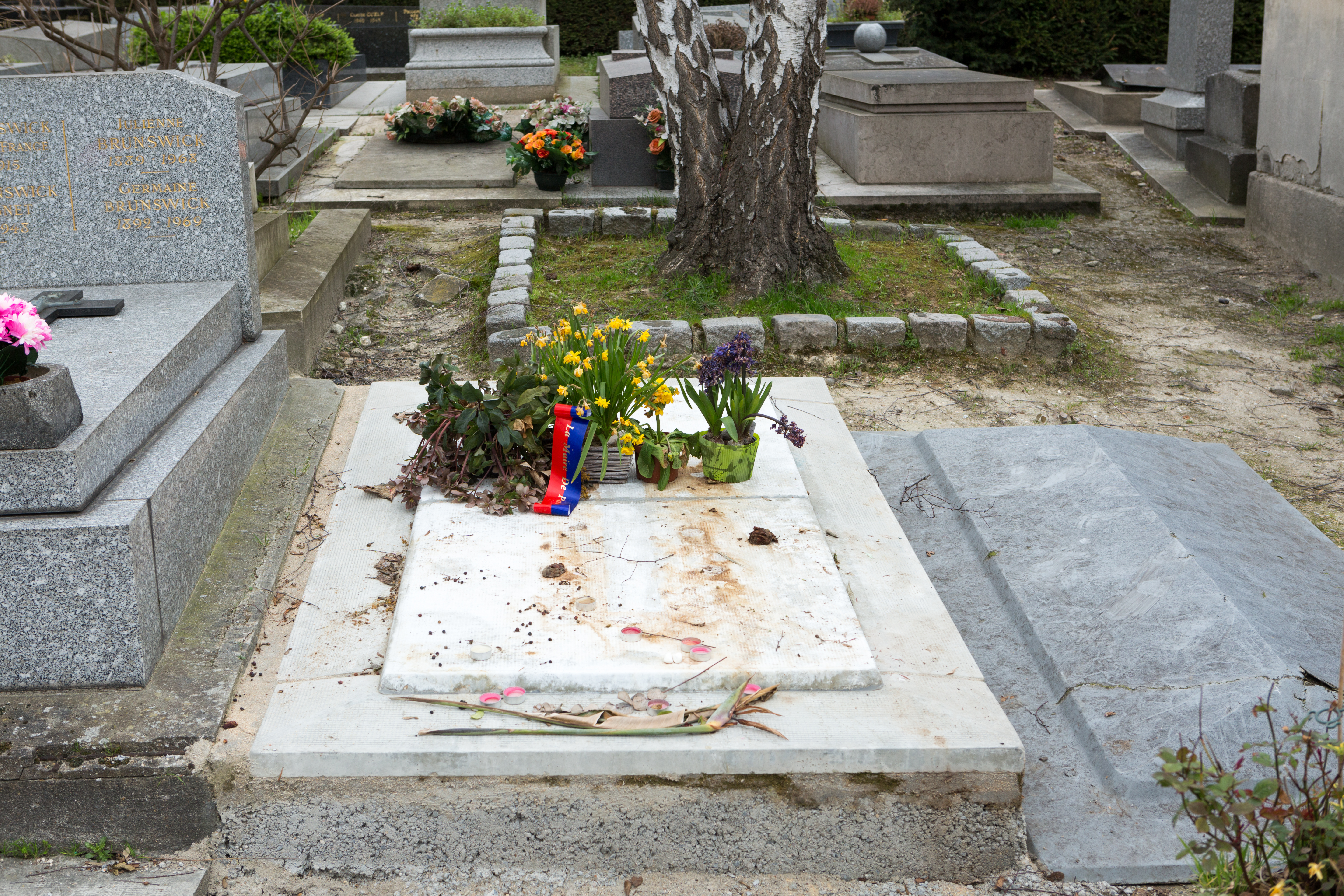 Sépulture d'Emmanuelle Riva (1927-2017), actrice de cinéma et de théâtre et poétesse française.